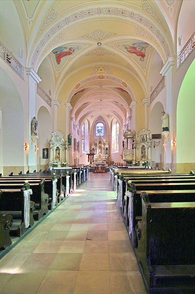 Pyskowice - kościół parafialny pw. św. Mikołaja (zabytek nr A/289/60 z 7.03.1960)